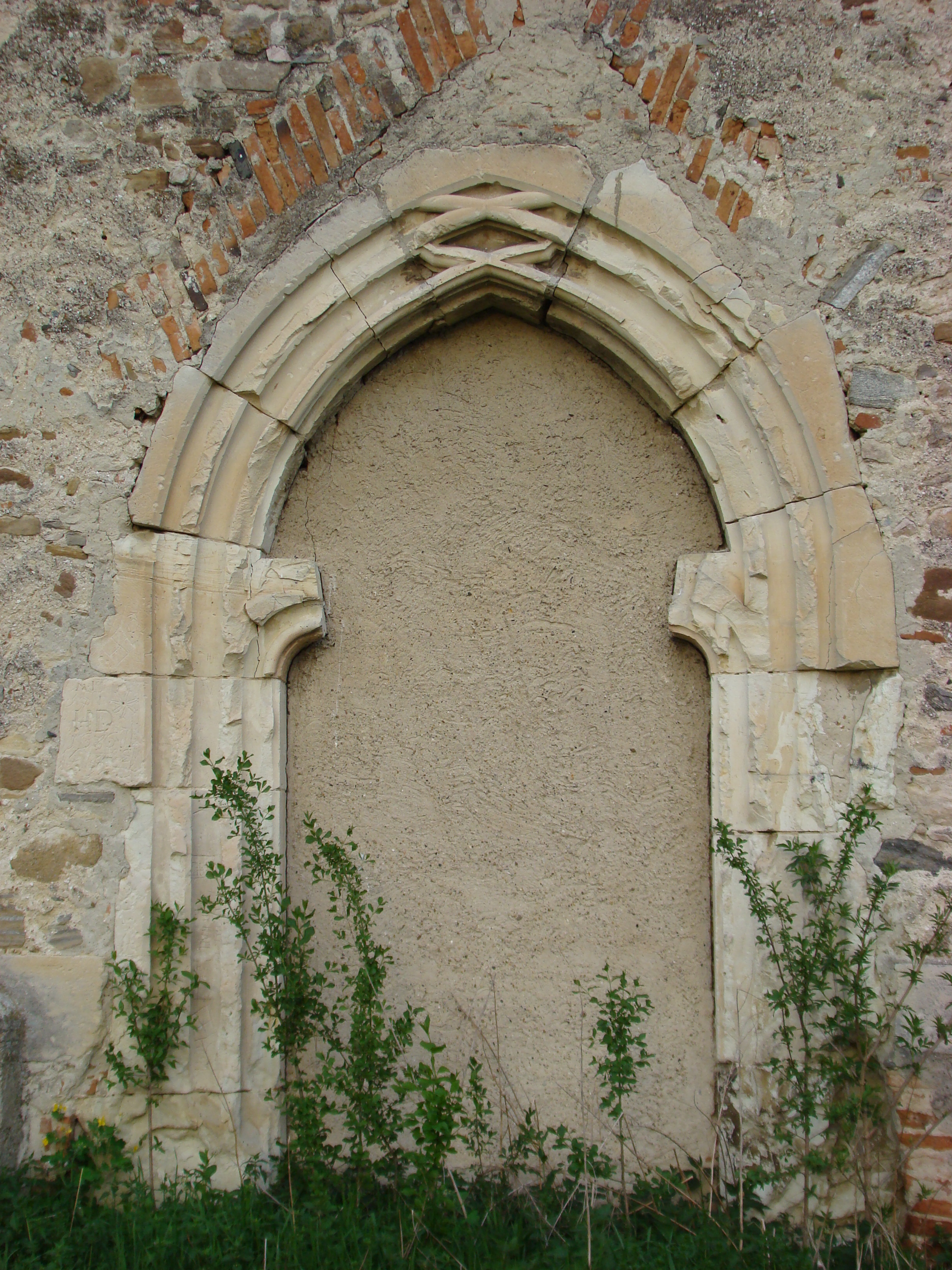 Evangelische Kirche von Vingard (Weingartskirchen), Alba, Siebenbürgen, Rumänien